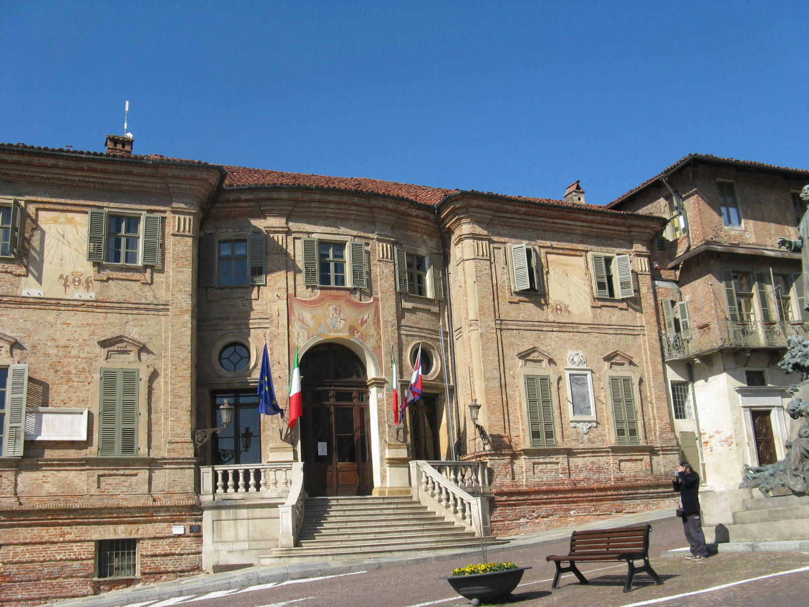 Palazzo Comunale This is a photo of a monument which is part of cultural heritage of Italy.